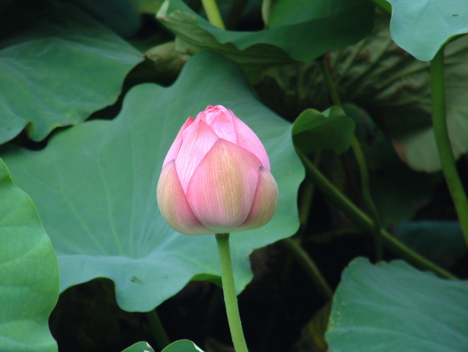 Nelumbo nucifera